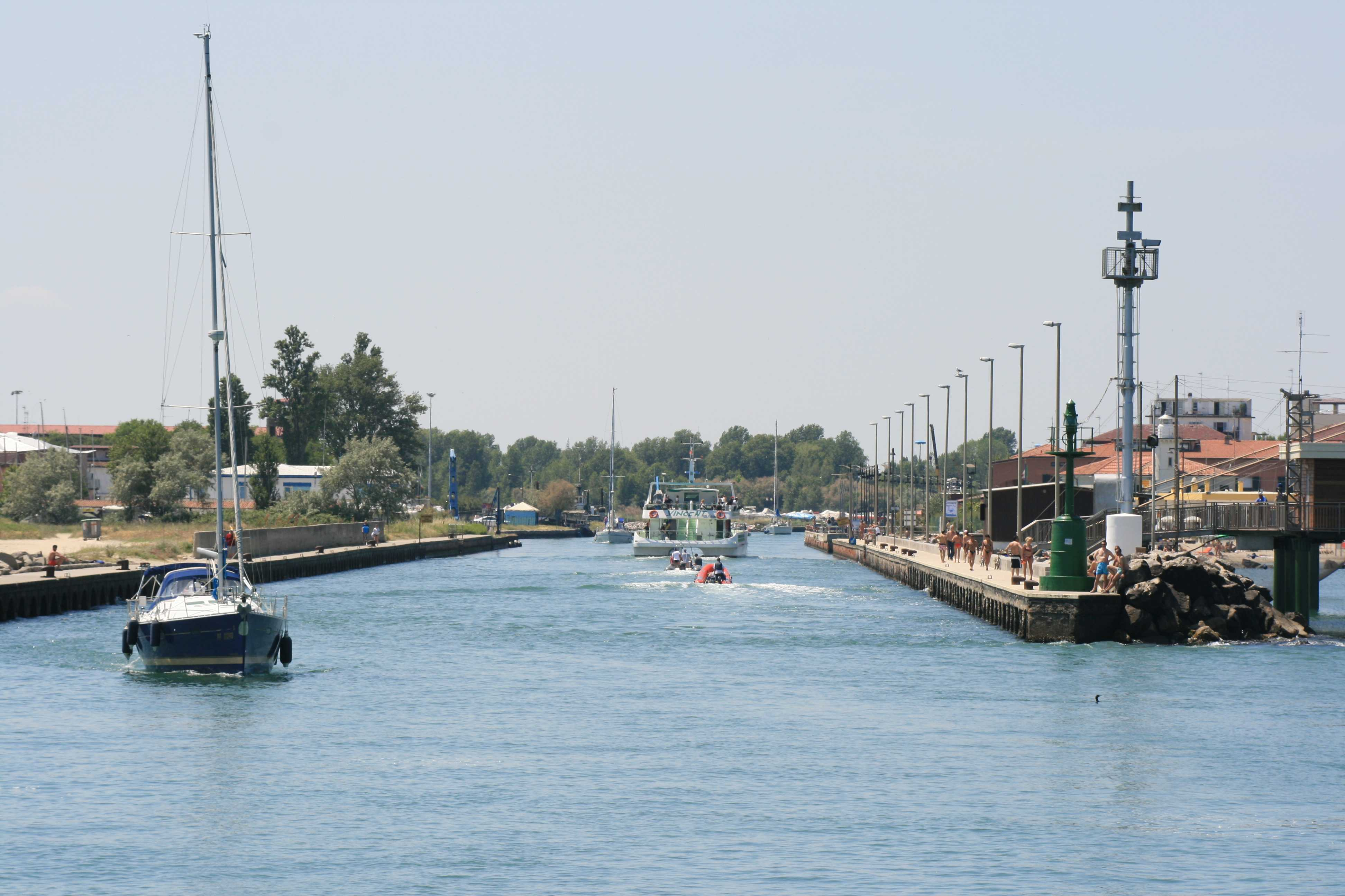 Porto Garibaldi: Imbocco del porto